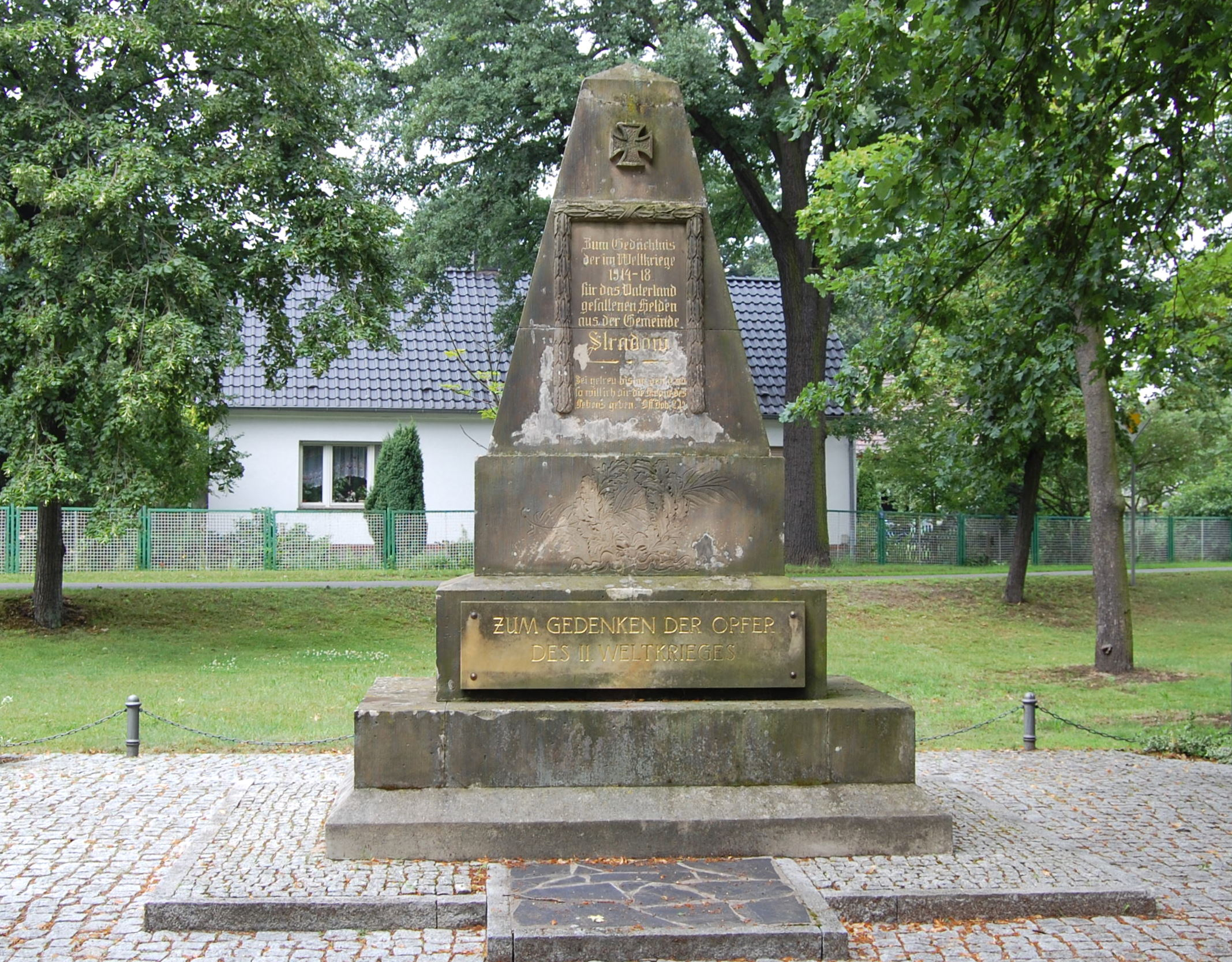 Kriegerdenkmal in Stradow (Vetschau) für die Gefallenen des Ersten Weltkrieges mit Tafel für die Gefallenen des Zweiten Weltkriegs